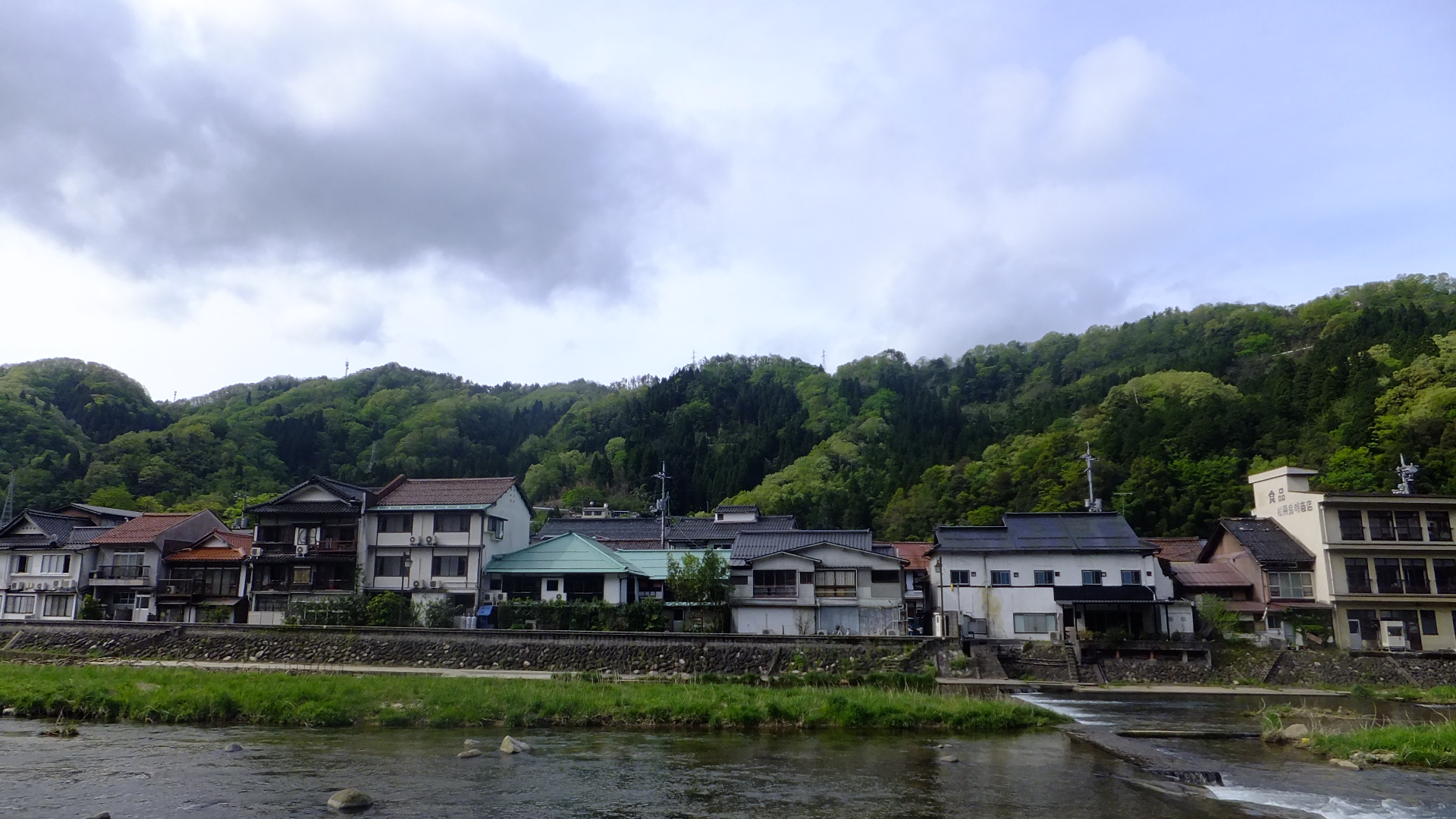 鳥取県東伯郡三朝町三朝